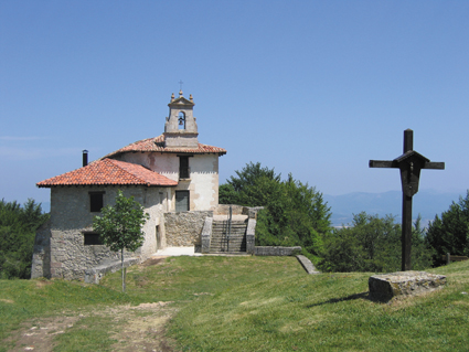 Ermita de San Vitor de Gauna